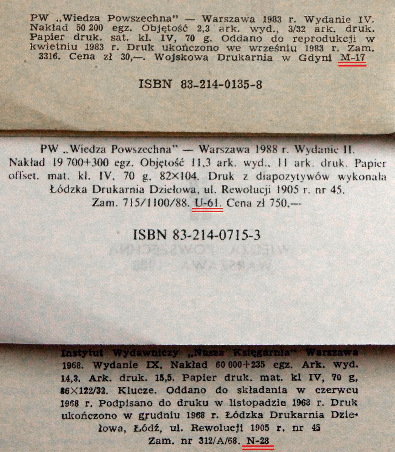 Stopki redakcyjne książek wydanych w okresie PRL. Od góry: 1) "Mini rozmówki francuskie" - W. Piechocki, Alina Wójcik, 1983, 2) "Wymowa francuska" - Antoni Platkow, 1988, 3) "W 80 dni dookoła świata" - Juliusz Verne, 1969. Podkreślone sygnatury cenzorów z Głównego Urzędu Kontroli Prasy, Publikacji i Widowisk.